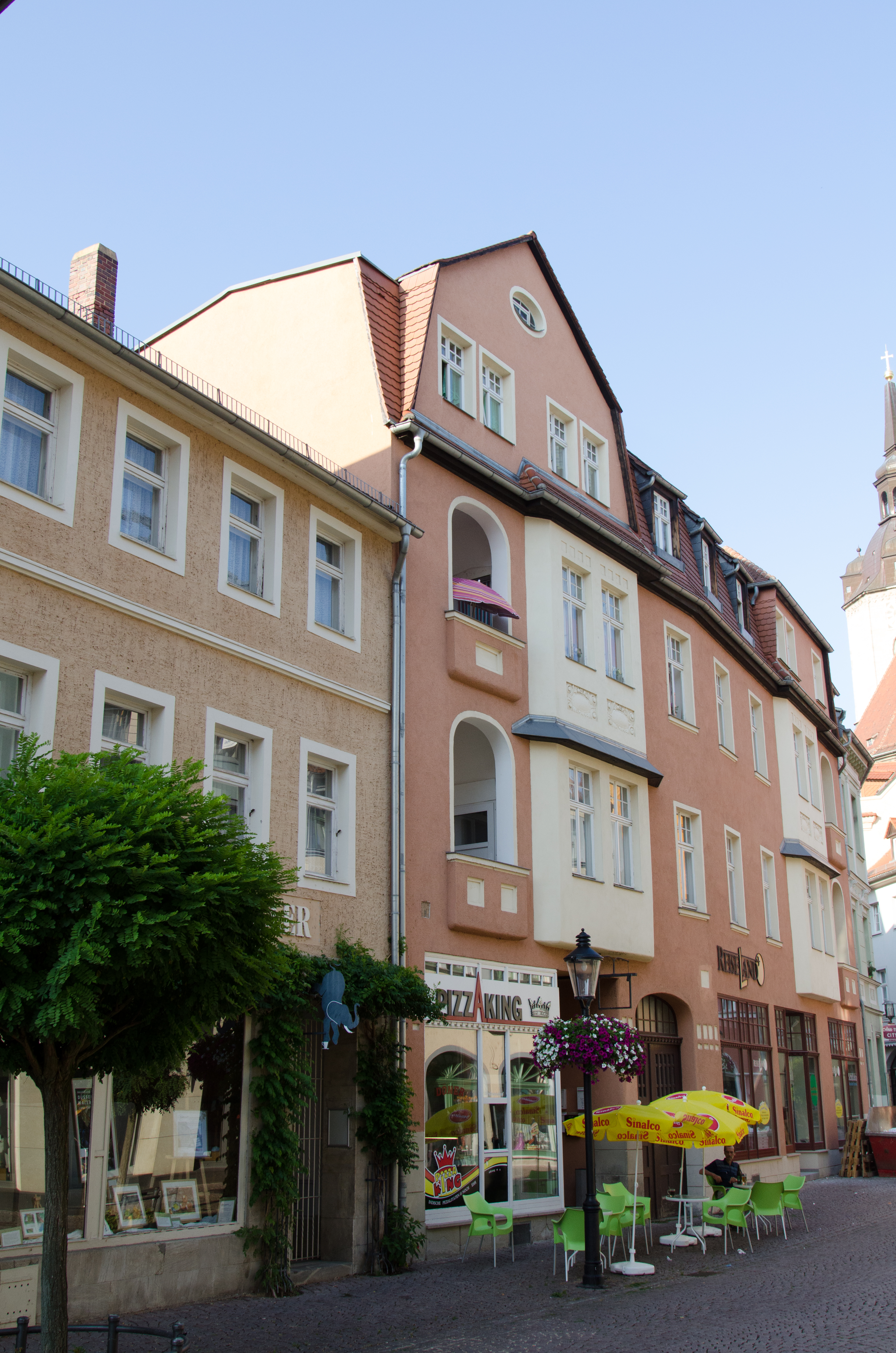 Naumburg, Salzstraße 6, 5, 4